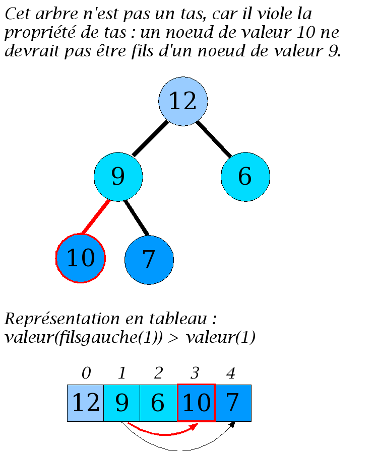 Informatique: contre-exemple de tas n°2